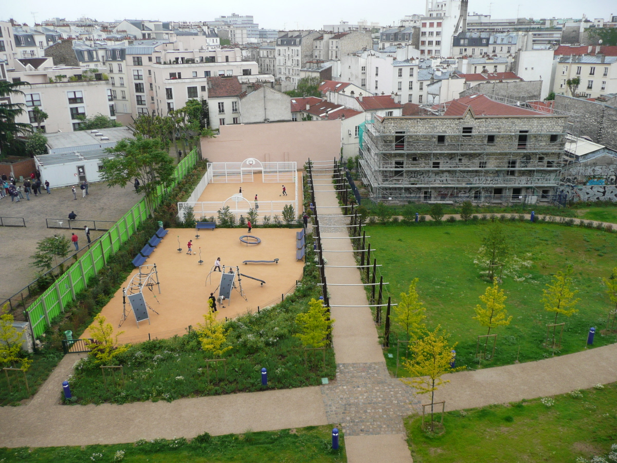 photo prise par mes soins le 17 mai 2007, ~michoko